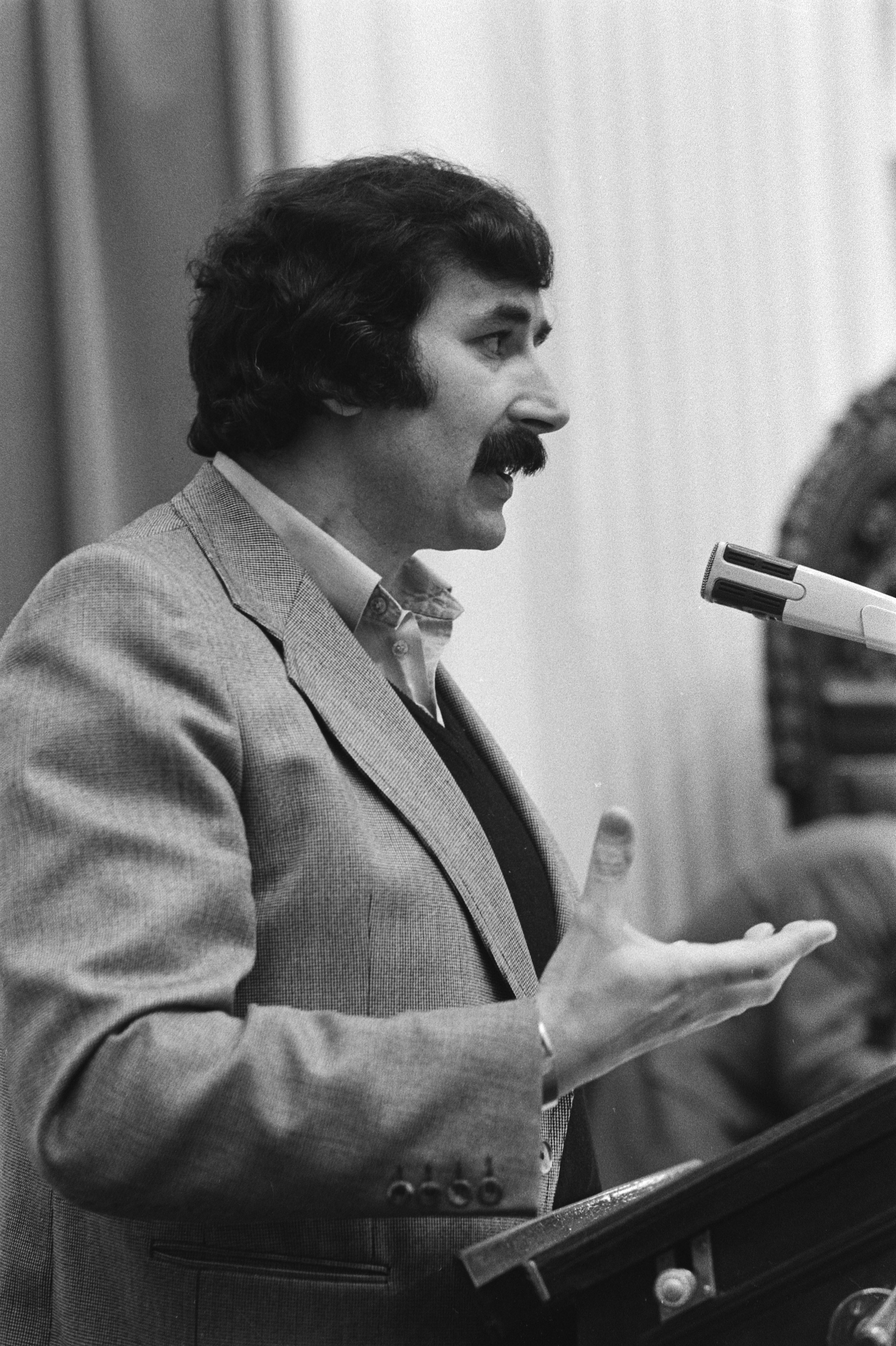 Collectie / Archief : Fotocollectie Anefo Reportage / Serie : Tweede kamer is bijeen om de begroting van het ministerie van Buitenlandse Zaken te bespreken Beschrijving : Harry van den Bergh aan het woord tijdens de behandeling van de begroting van Buitenlandse Zaken Datum : 4 februari 1981 Locatie : Binnenhof, Den Haag, Zuid-Holland Trefwoorden : microfoons, overheidsbegrotingen, parlementaire debatten, parlementariërs, parlementen, politiek Persoonsnaam : Bergh, H.J. van den Instellingsnaam : CDA Fotograaf : [onbekend] Auteursrechthebbende : Nationaal Archief Materiaalsoort : Negatief (zwart/wit) Nummer archiefinventaris : bekijk toegang 2.24.01.05 Bestanddeelnummer : 931-3024